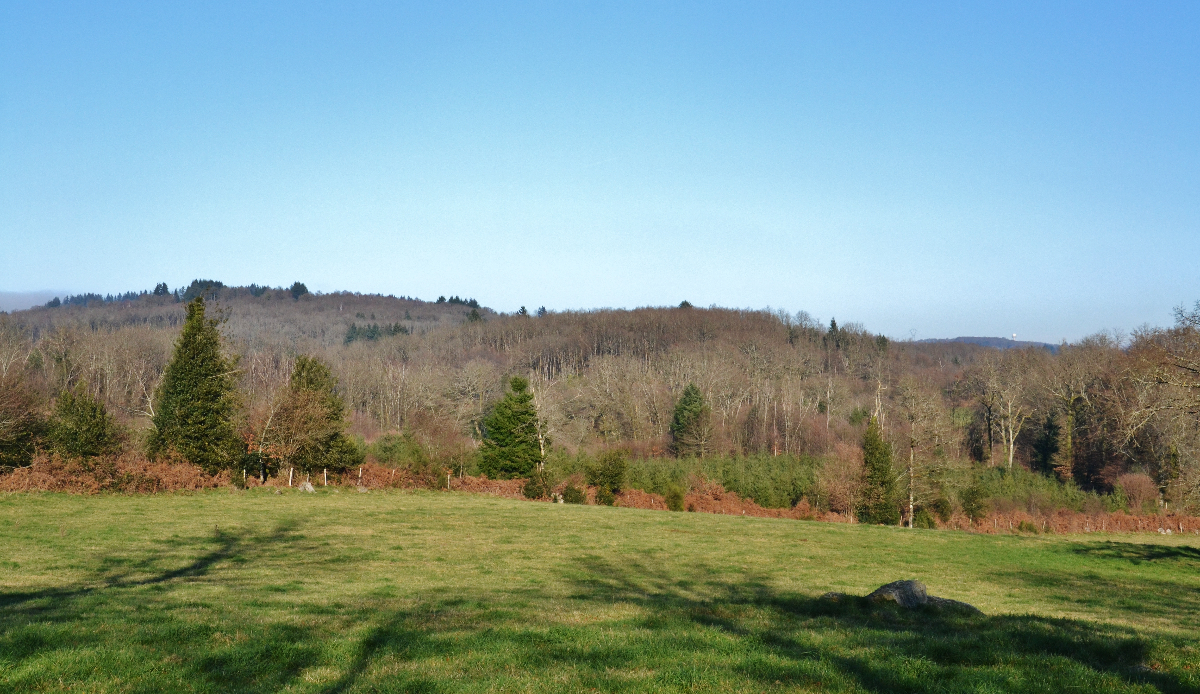 Vue des monts de Blond (partie occidentale moins abrupte que le flanc sud ou le flanc est)